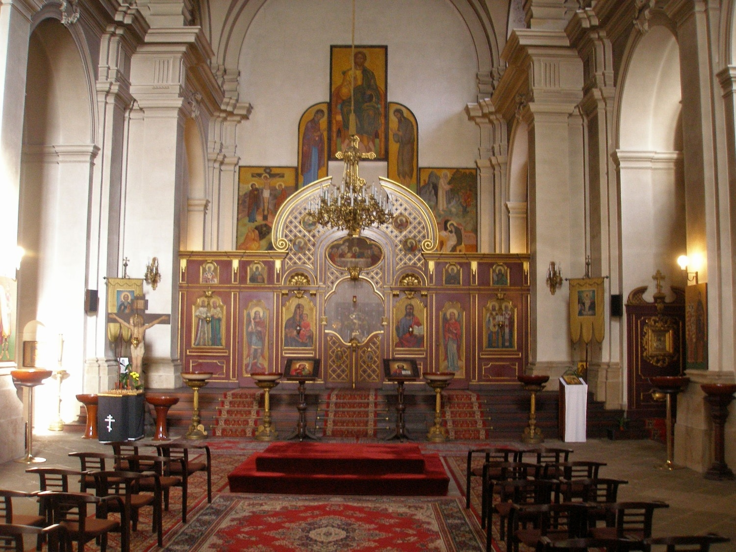 Interiér kostela sv. Cyrila a Metoděje, Praha